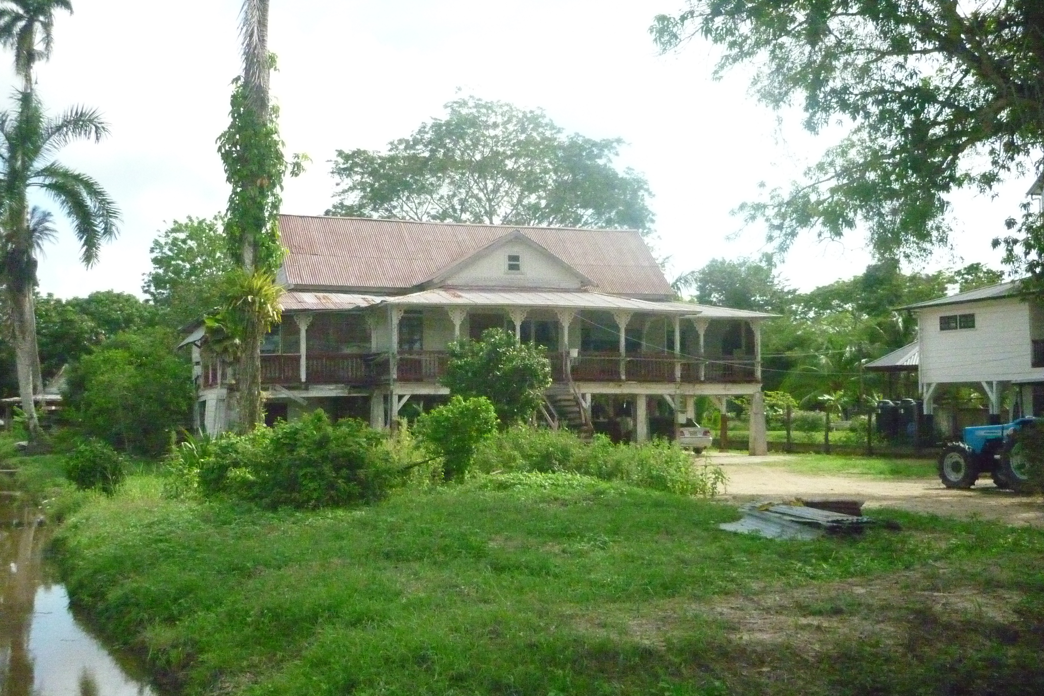 directeurswoning op plantage Peperpot